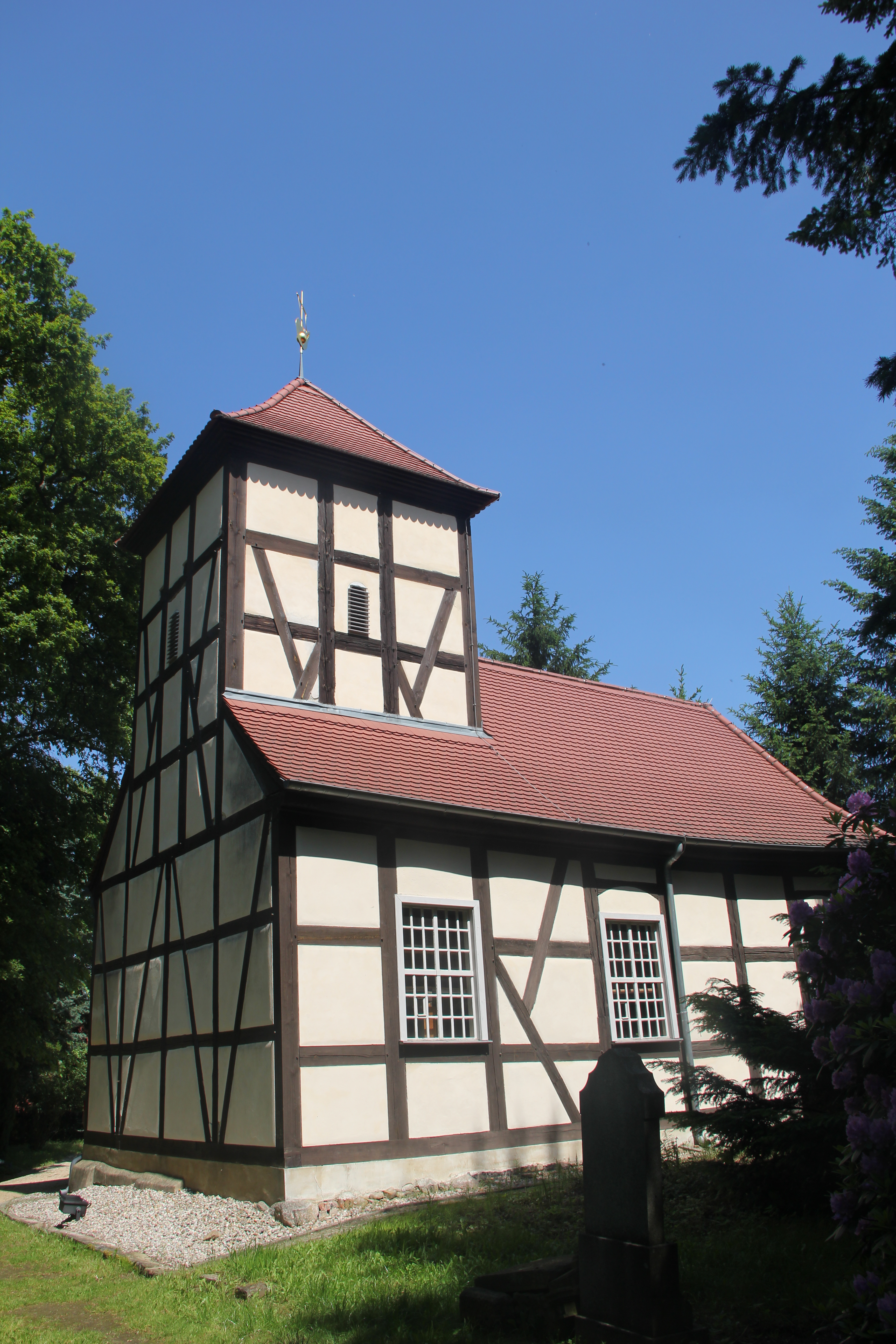 Evangelische Kirche in Ferch